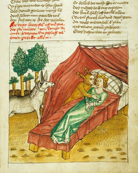 „barczifal vsz vnd gnadet siner můtter vnd kompt czu einer herczogin die schlieff vnder einem gezellt alein“ (Parzival im Narrenkleid umarmt die Herzogin Jeschute), Cod. AA 91, fol. 23r, 1467, Burgerbibliothek Bern.